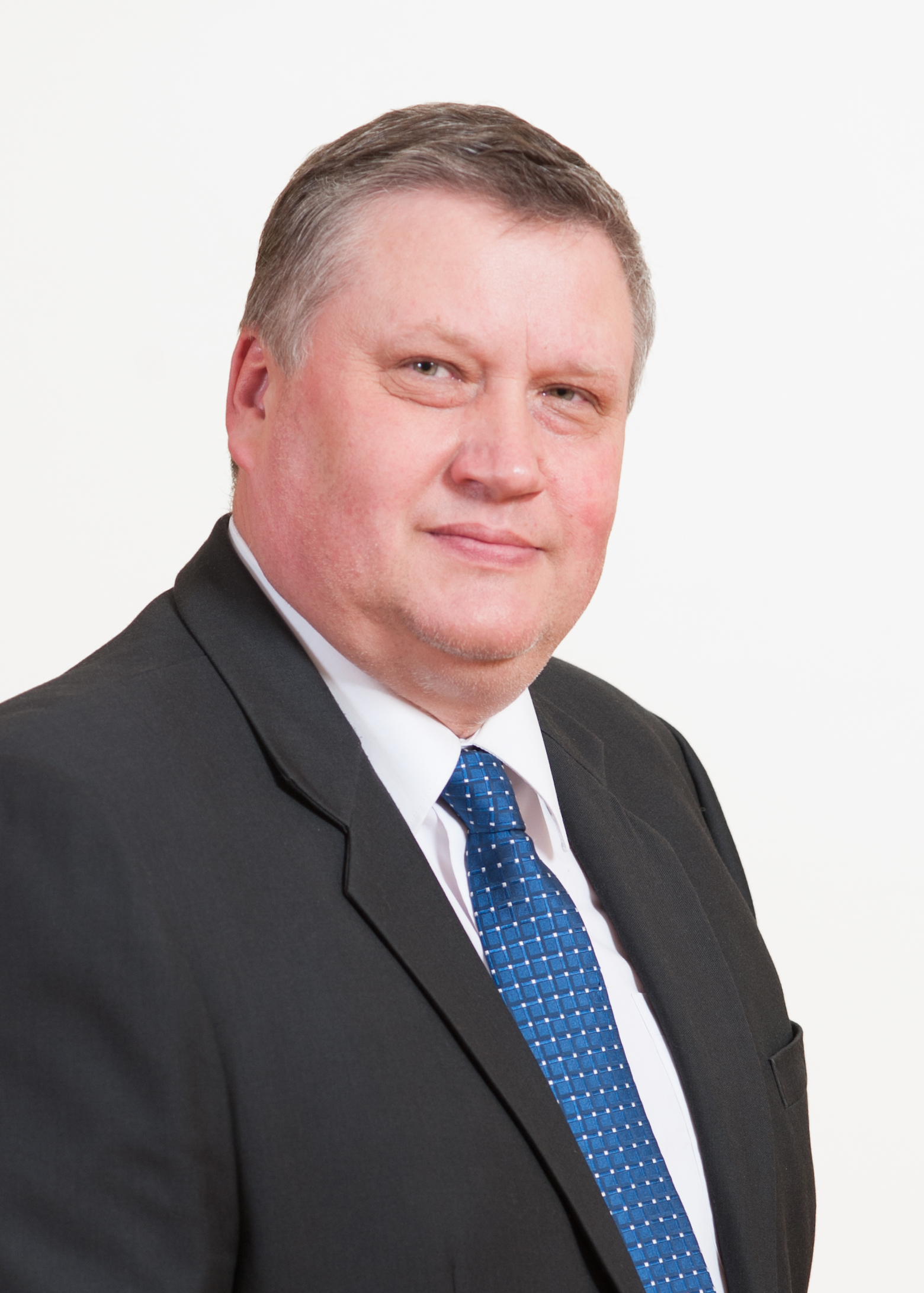 Jaanus Marrandi